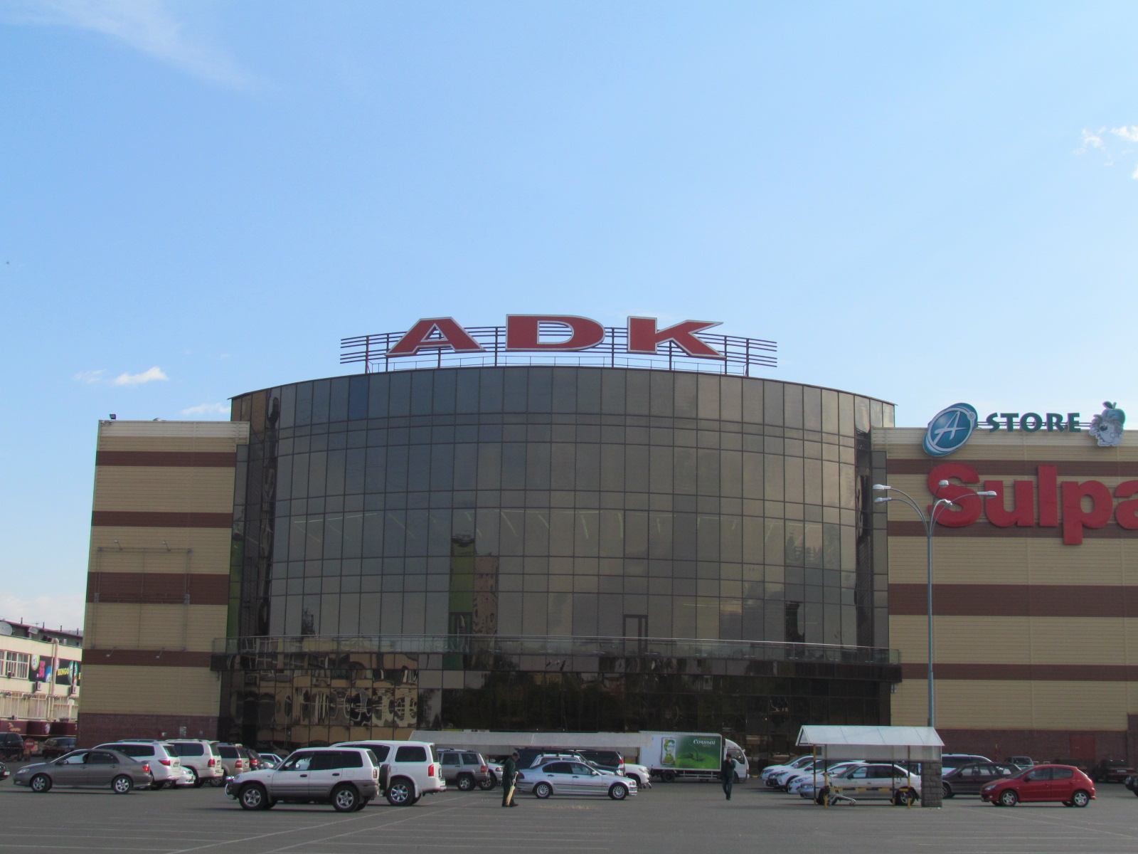 Торгово-развлекательный комплекс АДК (западный вход), построенный на месте домостроительного комбината (2 октября 2014)